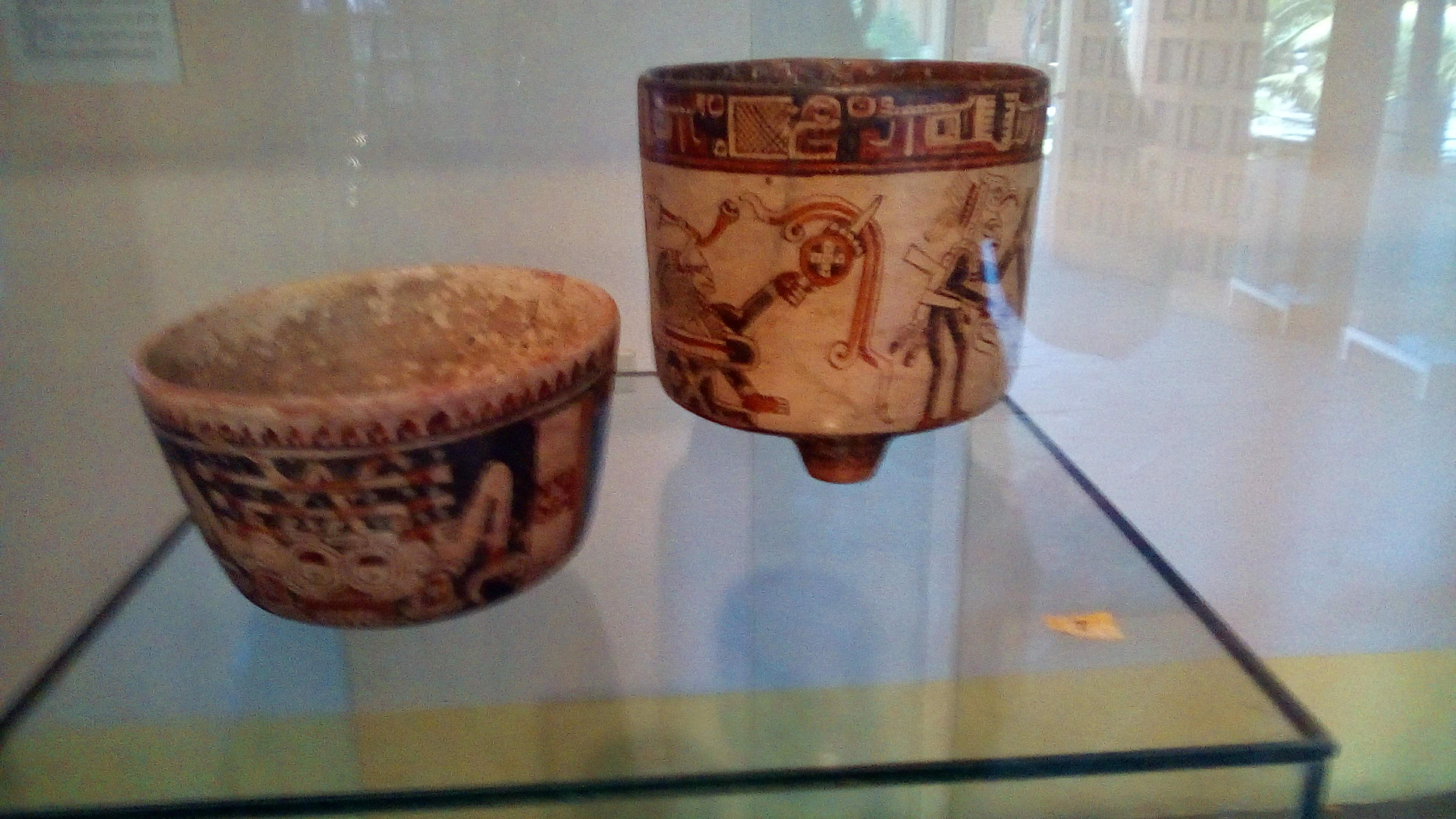 Vasijas de mas de 1,000 años de los Lencas